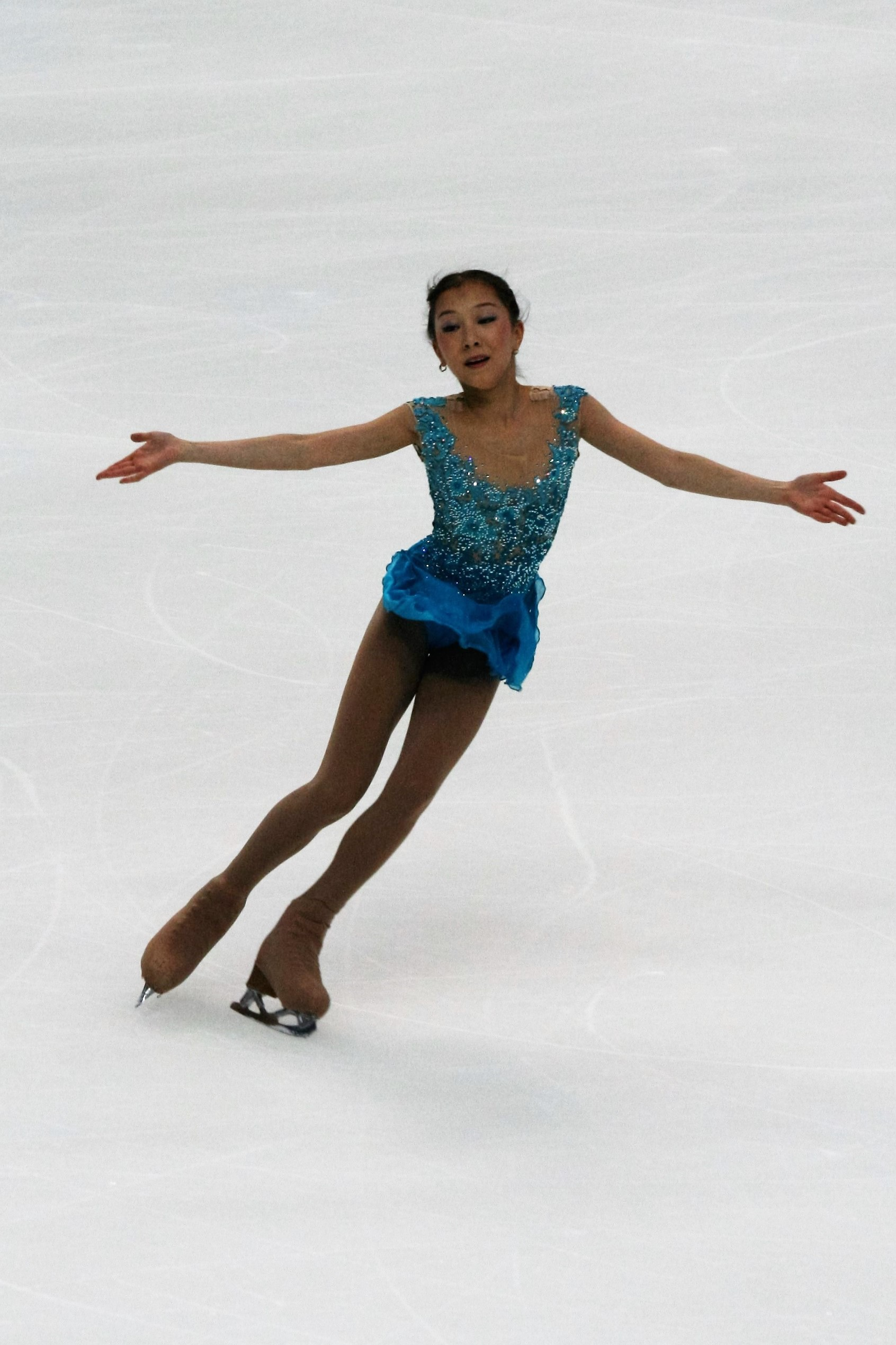 Элизабет Турсынбаева (Казахстан) на Кубке Ростелекома 2016